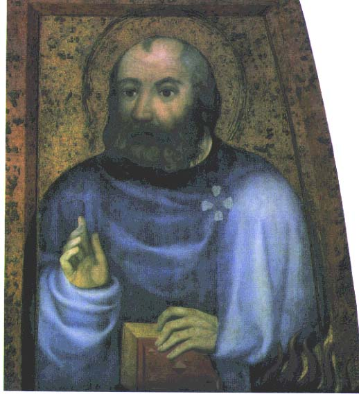 Self-portrait of Meister Theoderich von Prag (?)